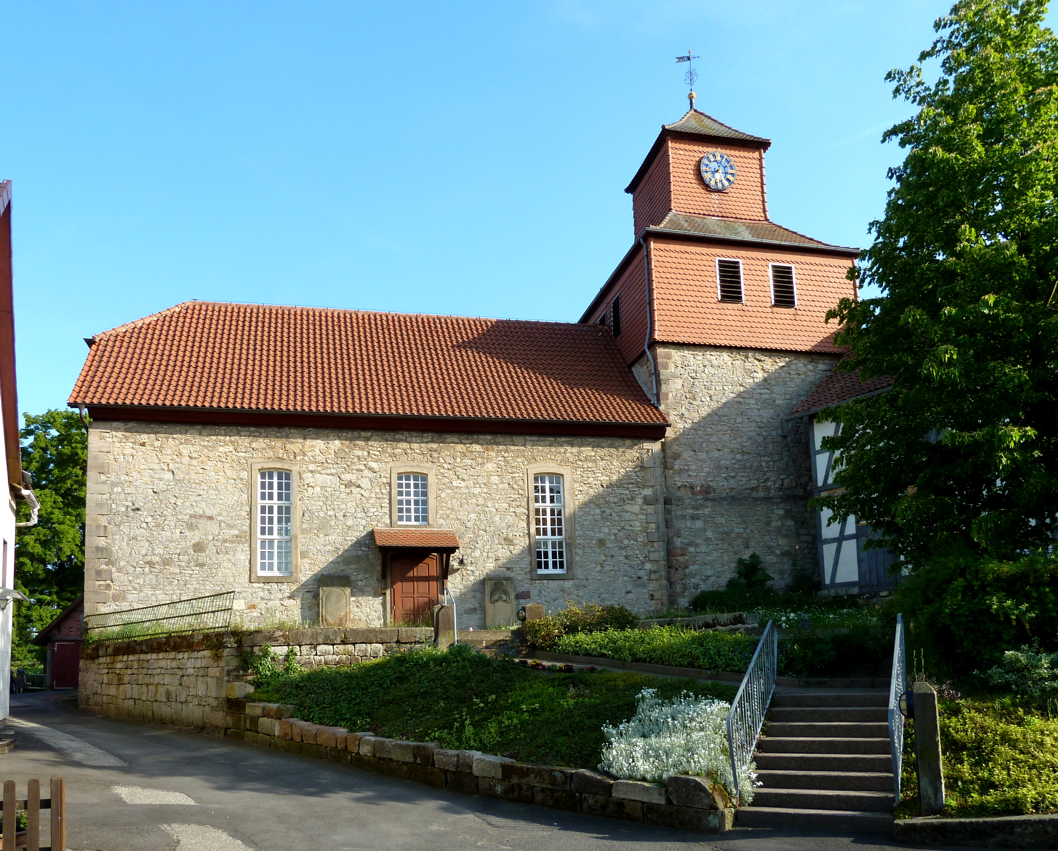 Ev.-luth. Kirche St. Johannes der Täufer in Meensen, Gemeinde Scheden, Landkreis Göttingen. Turm mittelalterlich, Langhaus aus der zweiten Hälfte des 18. Jahrhunderts. Blick auf die Nordseite.